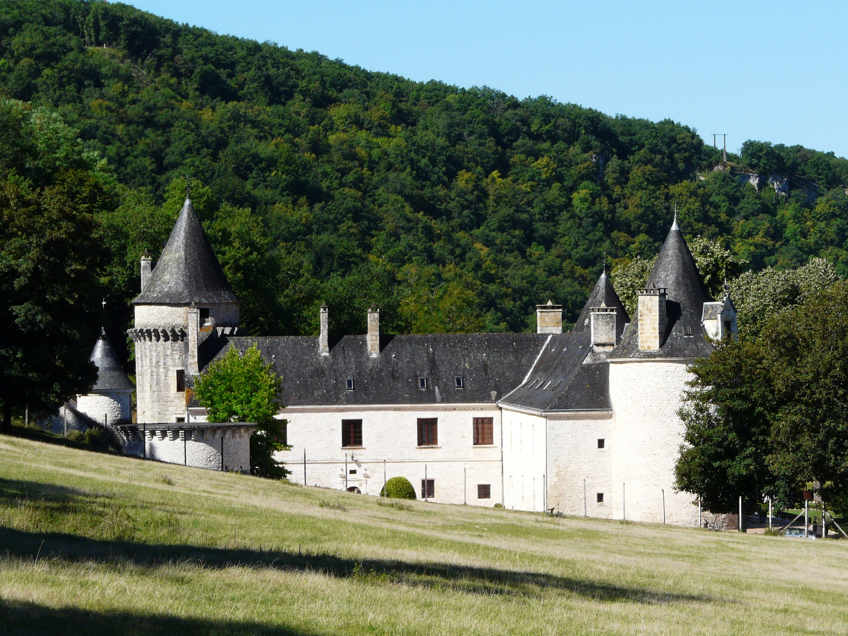 Le château de la Fleunie, Condat-sur-Vézère, Dordogne, France